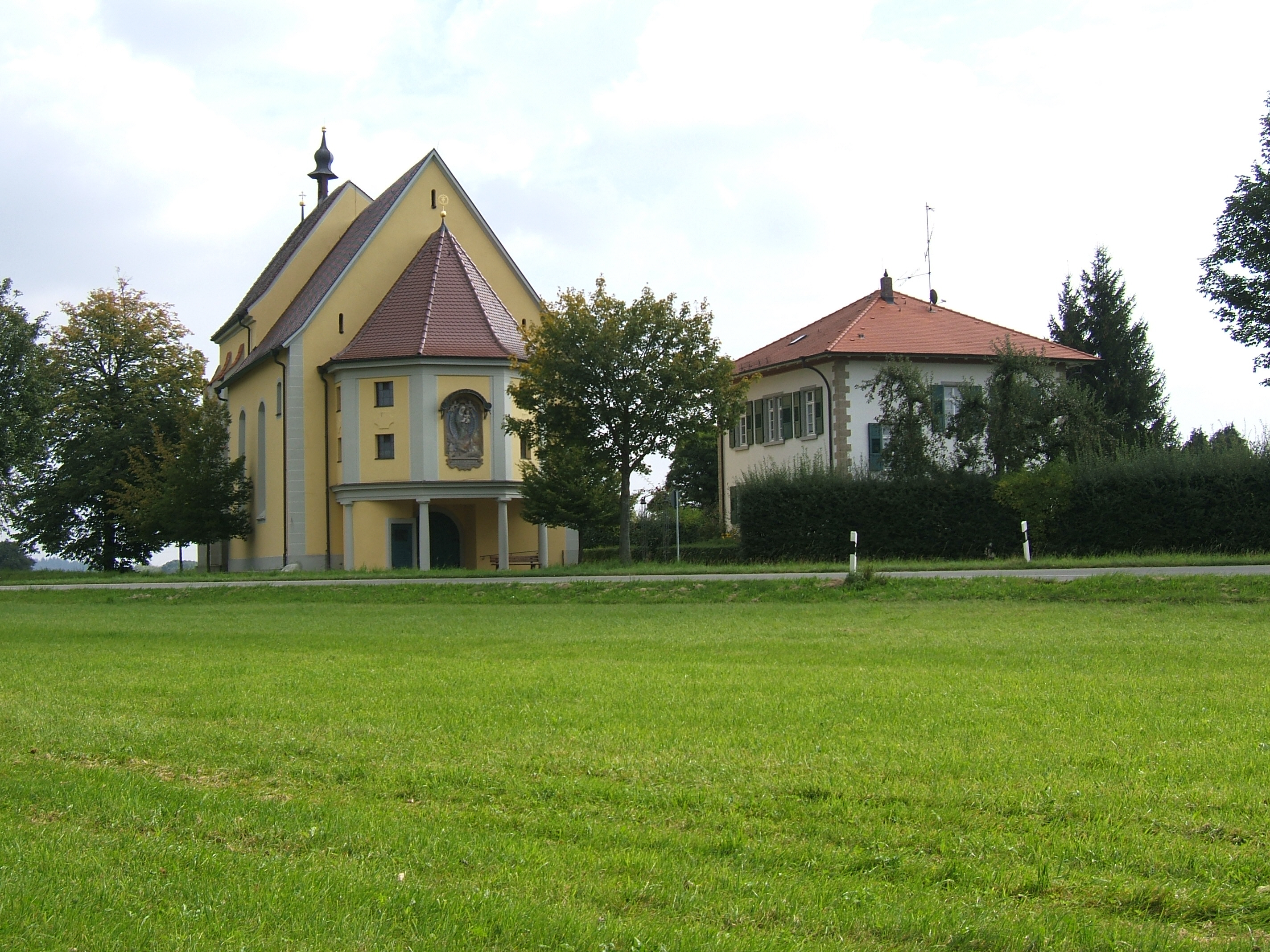 Pfullendorf, Schächergasse: Maria Schray. Katholische Wallfahrtskirche